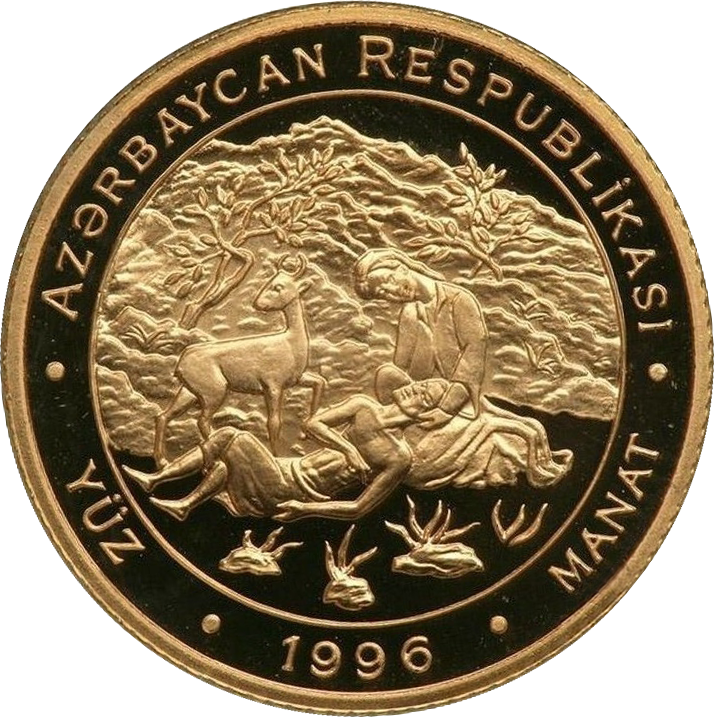 Məhəmməd Füzulinin xatirəsinə həsr olunmuş qızıl sikkə